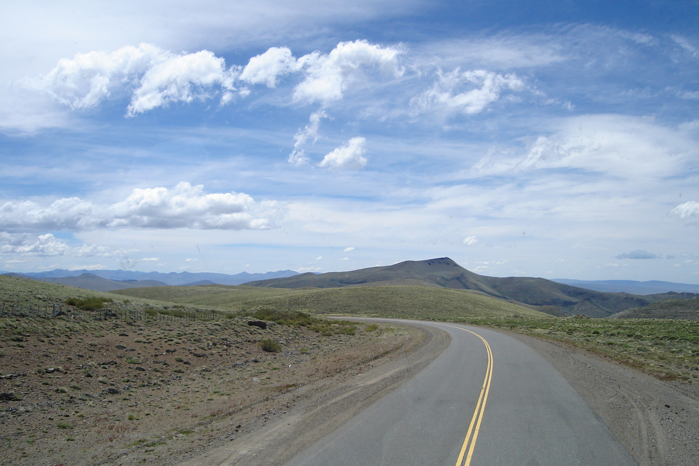 Ruta Nacional 242 cerca del Paso de Pino Hachado en la provincia de Neuquén, Argentina